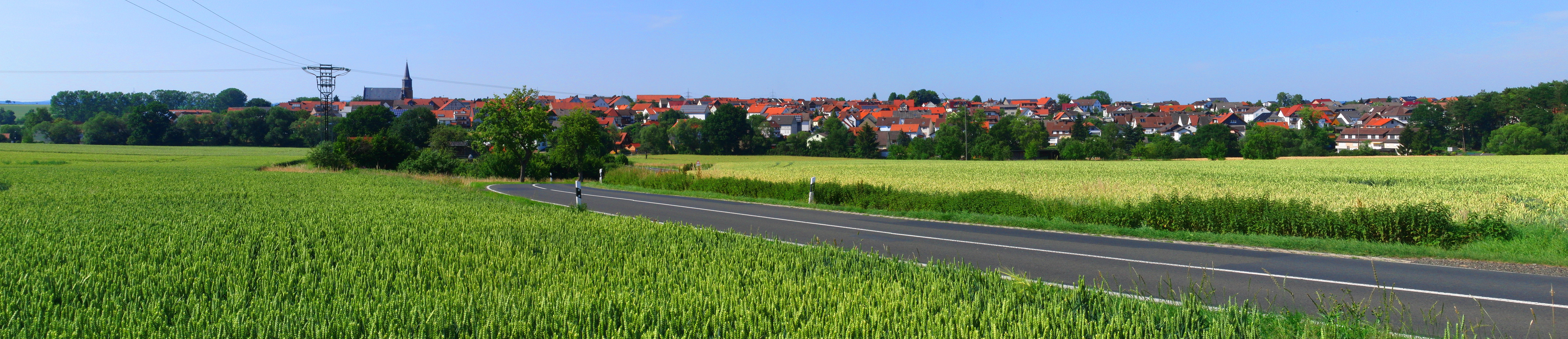 Panorama von Wasenberg (Willingshausen) Hinweis: erstellt mit der Freeware Hugin 2010